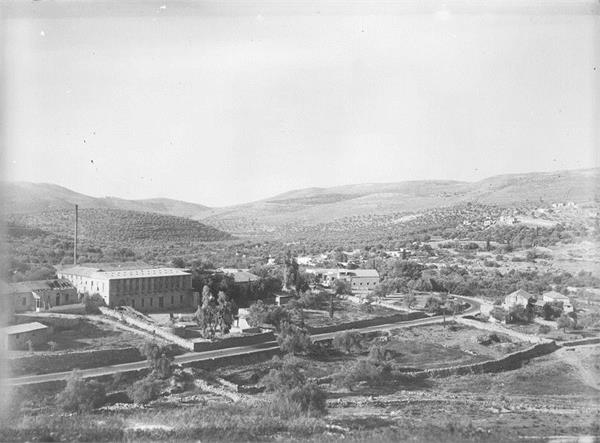 מוצא - בית חרושת לרעפים.